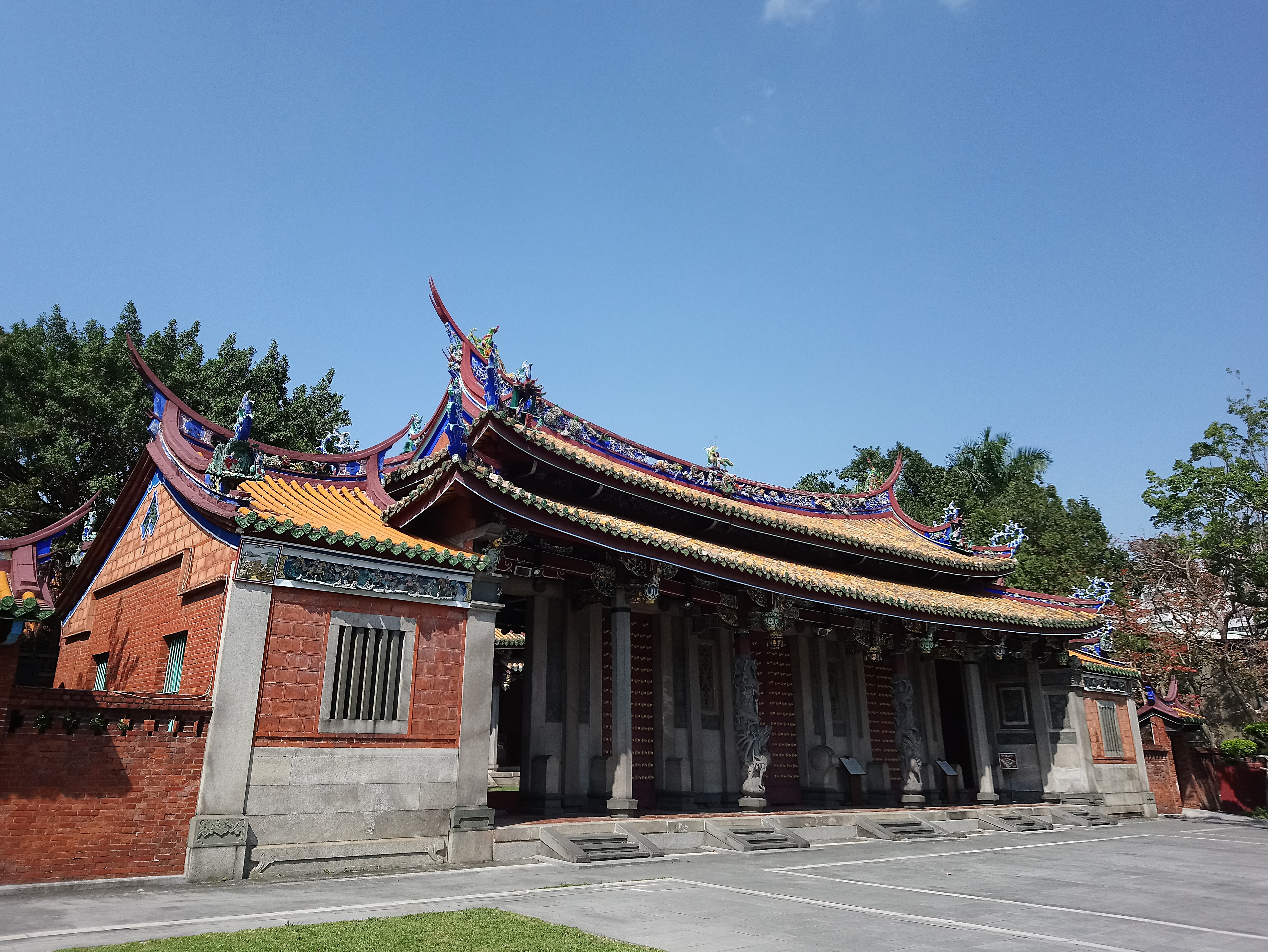 臺北孔子廟欞星門,臺北市大同區大龍次分區保安里